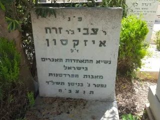 קברו של צבי איזקסון בנחלת יצחק צילום: אלי אלון